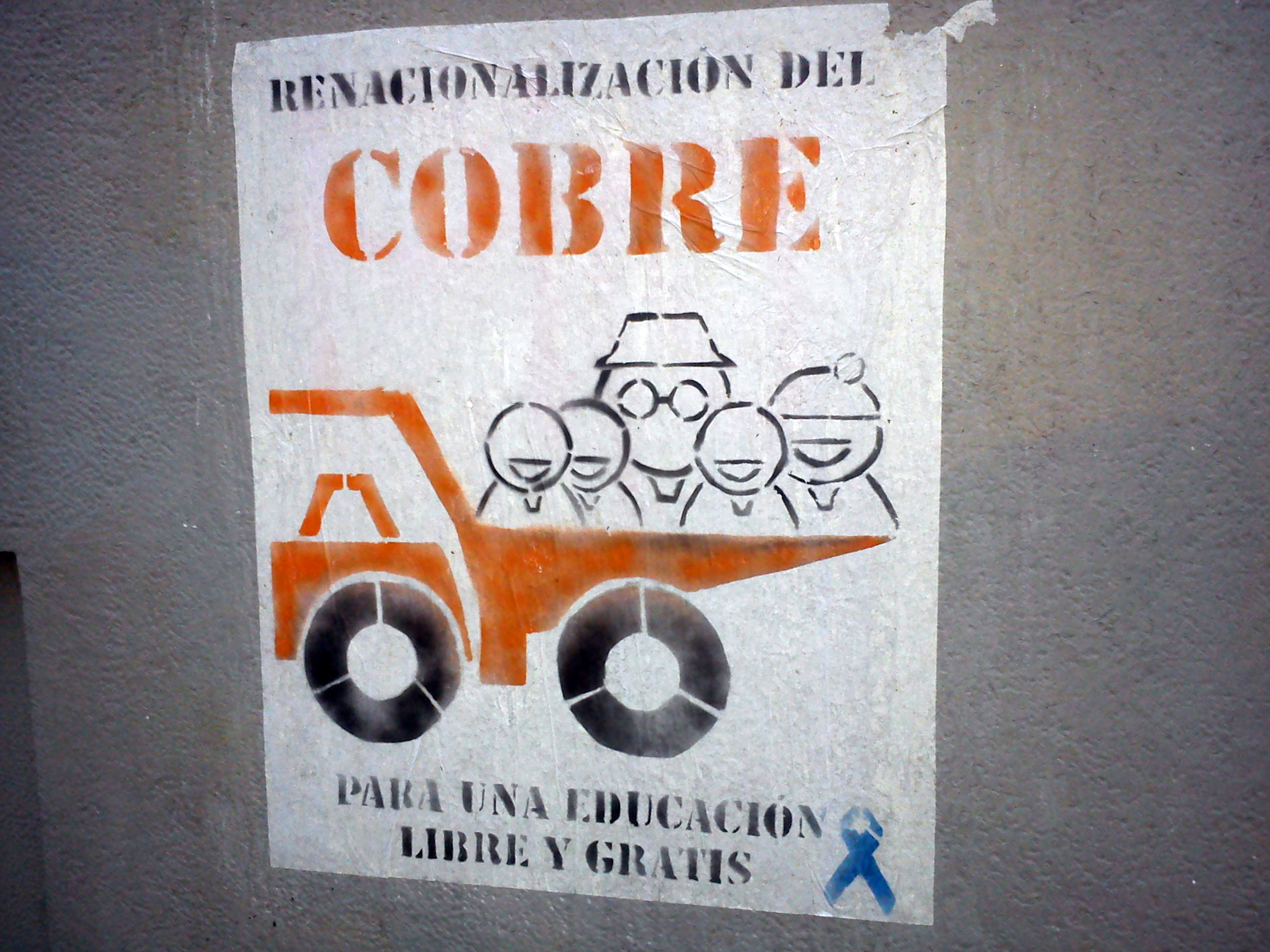 Pancarta exigiendo renacionalizar el cobre chileno para sustentar reformas al sistema educacional